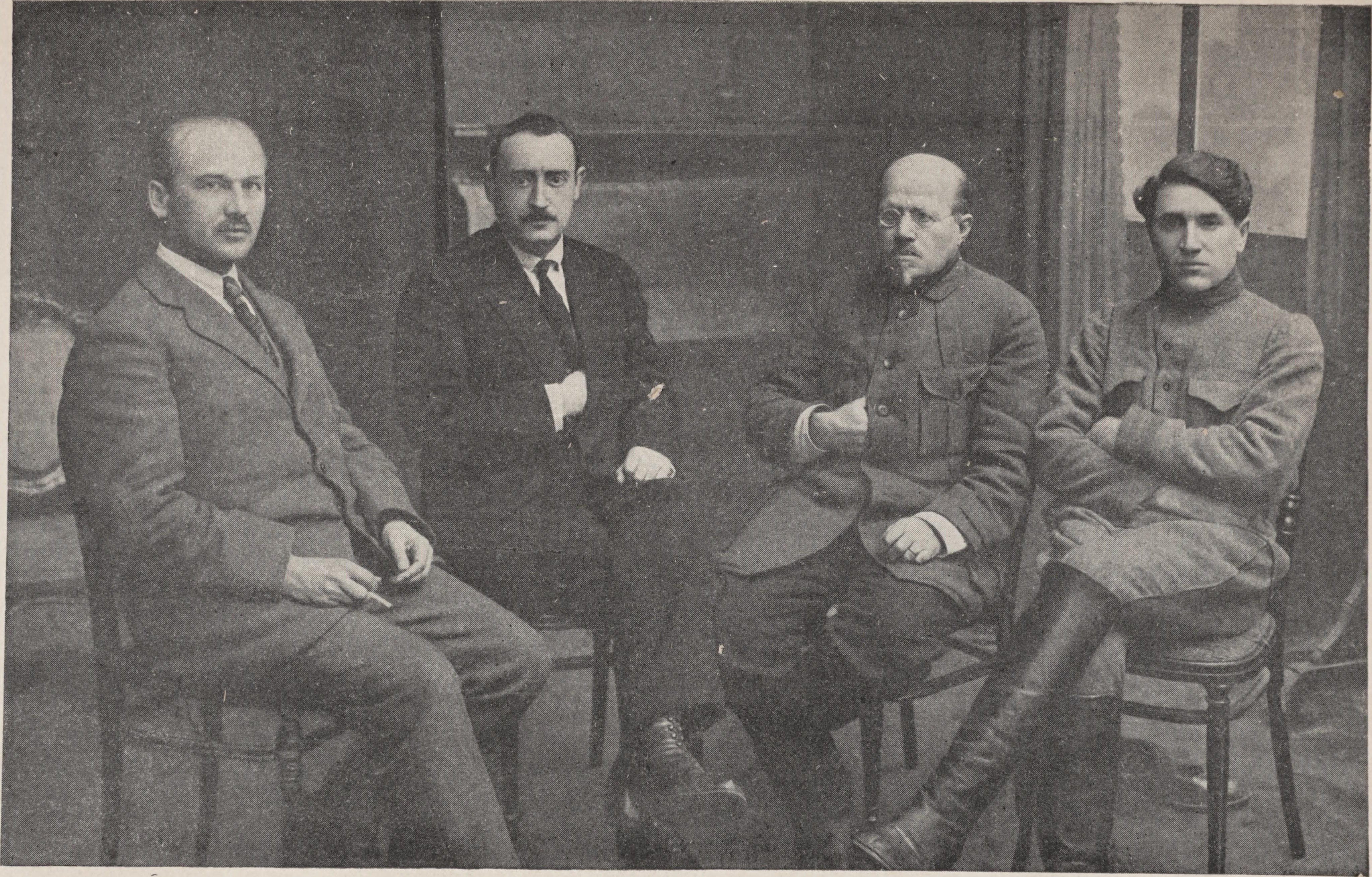 Mirsaid Sultangaliyev ve Narkomnats (Milletler Halk Komiserliği) Komiserleri, 1923. Soldan sağa: Gustav Kasparoviç/Gasparoviç Klinger - Grigori Broydo (Zamnarkom'dan) - Mihail Pavloviç (Komintern Doğu Halkları Seksiyonu Hareket Sovyeti Başkanı) - Mirsaid Sultangaliyev